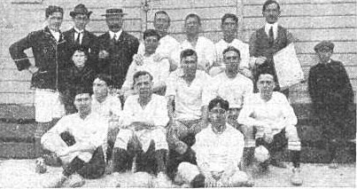 Formación del Club Atlético Argentino de Quilmes